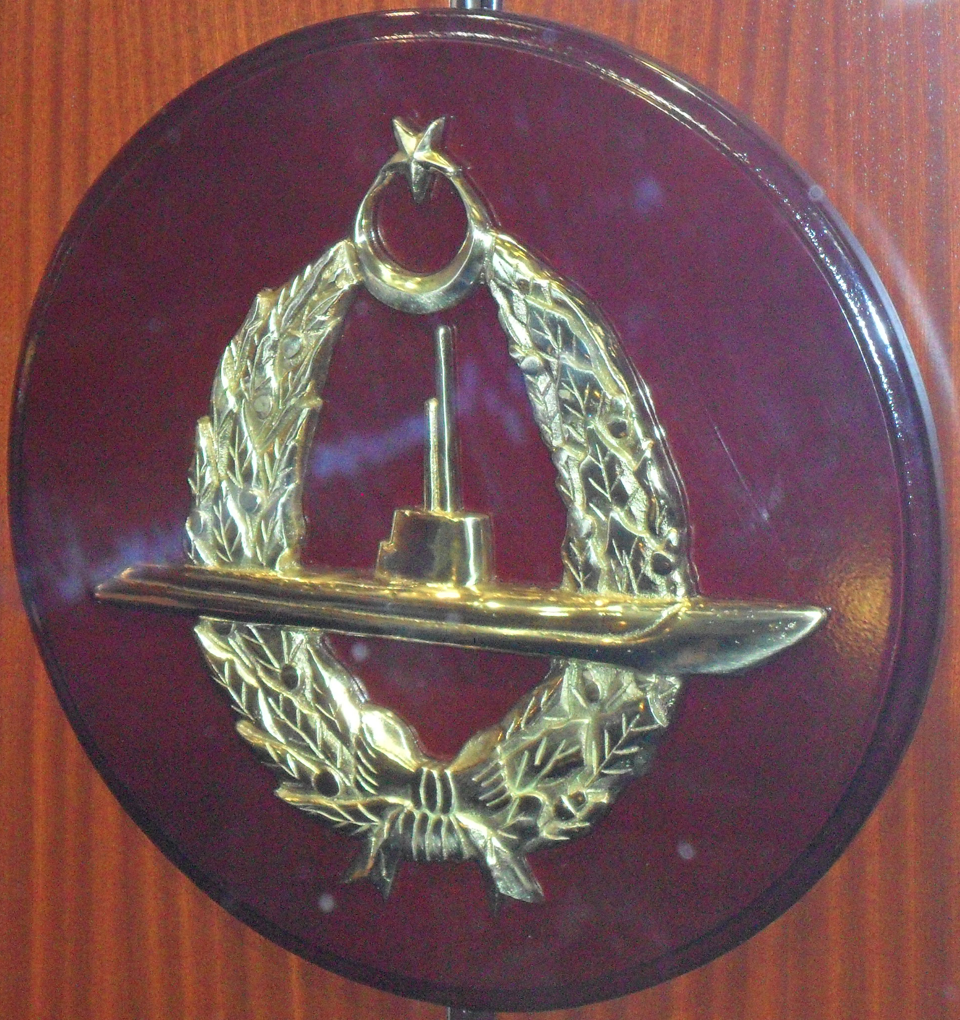 Mersin Deniz Müzesinde sergilenmekte olan TCG Dumlupınar denizaltısı arması.